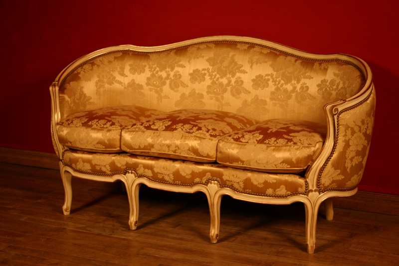 Canapé 'Ottoman' de style Louis XV, en gondole 155 cm, réplique d'un modèle ancien, réalisée par les Ateliers Allot Frères.